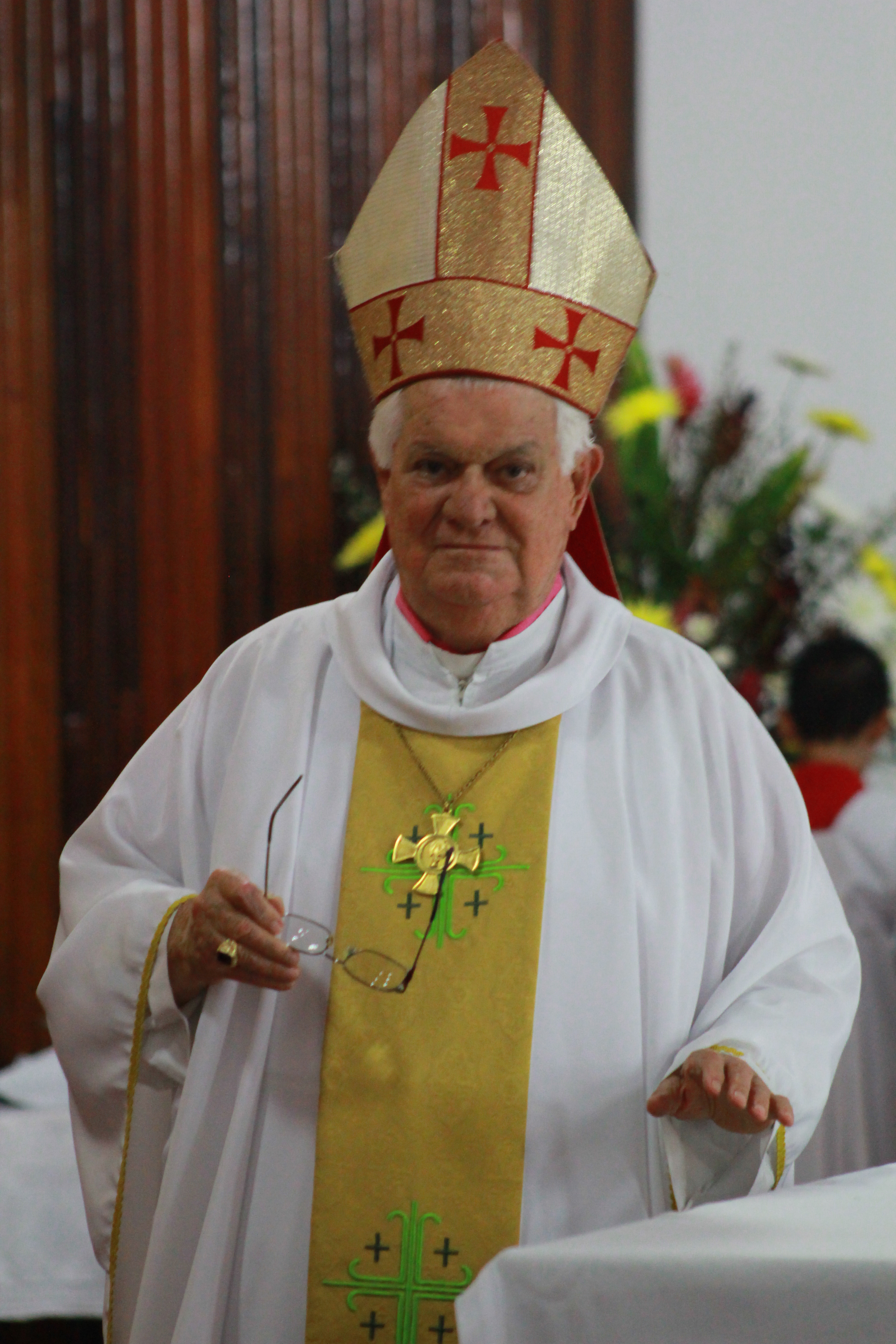 Obispo emérito de la Diócesis de Tilarán